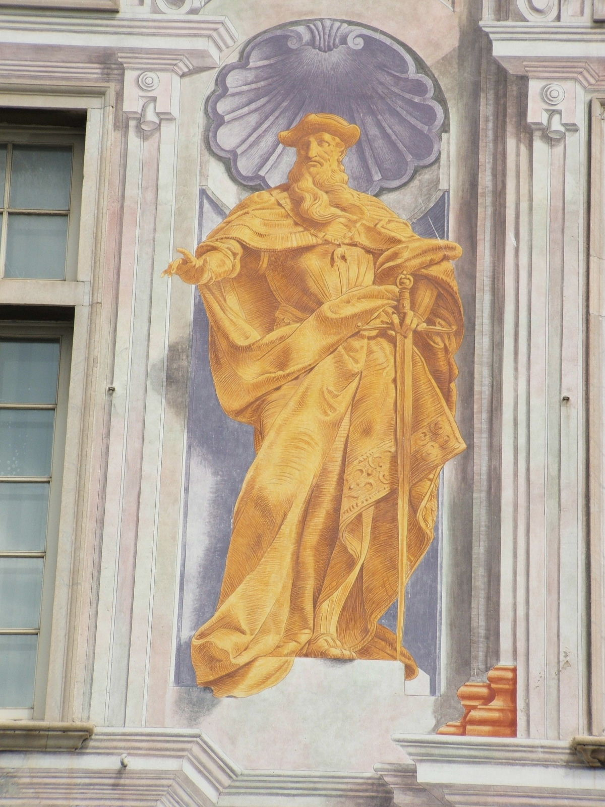 quinta immagine da destra (seconda da sinistra) raffigurata sulla facciata principale